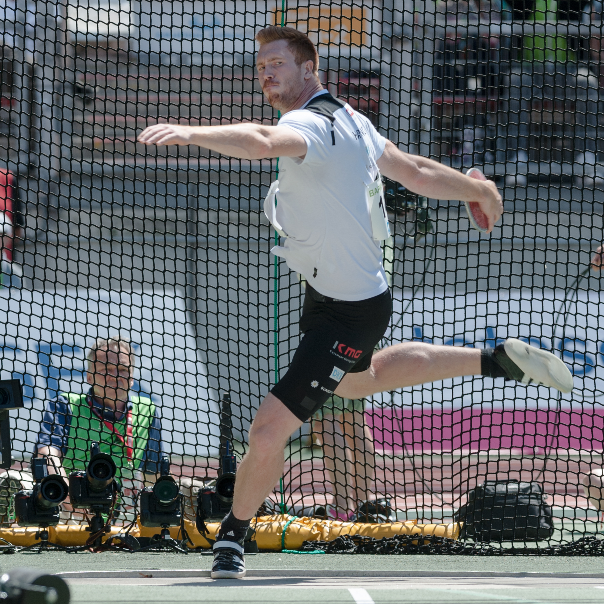 Deutsche Leichtathletik-Meisterschaften 2015: Männer Diskuswurf - Christoph Harting, SCC Berlin